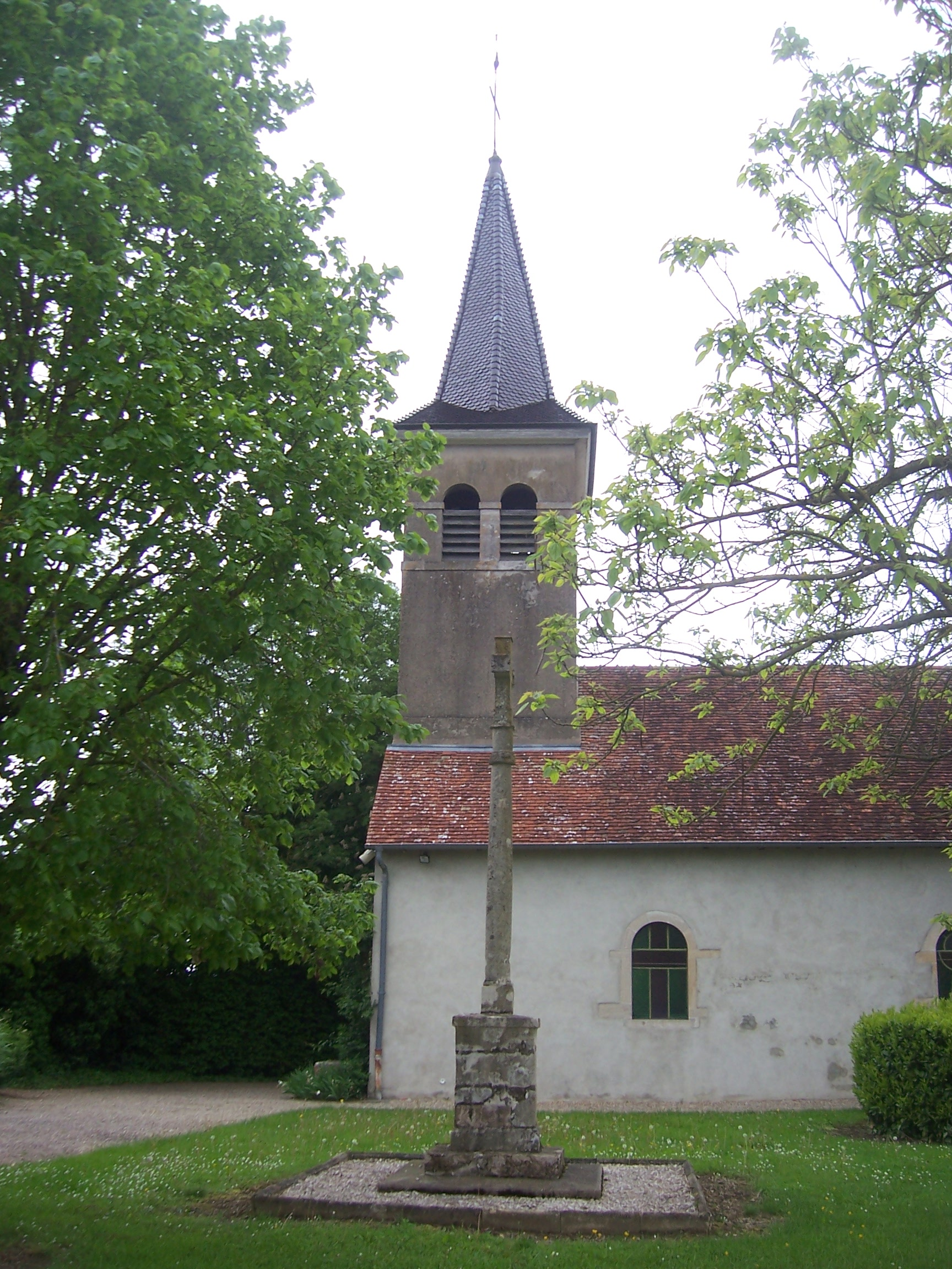 Eglise de Juif